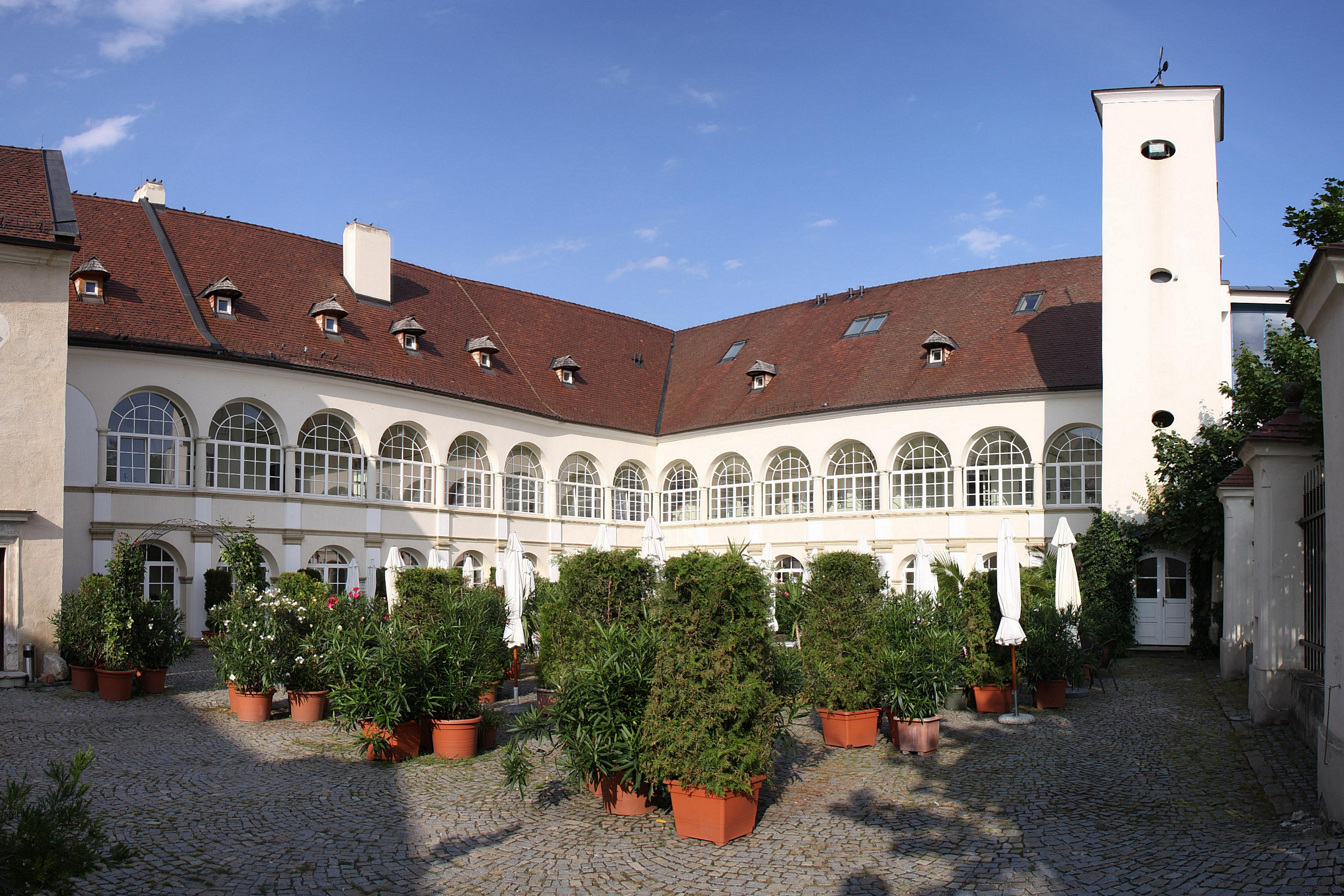 Denkmalgeschütztes Schloss in Katzelsdorf. Object location47° 46′ 44.69″ N, 16° 16′ 16.75″ E